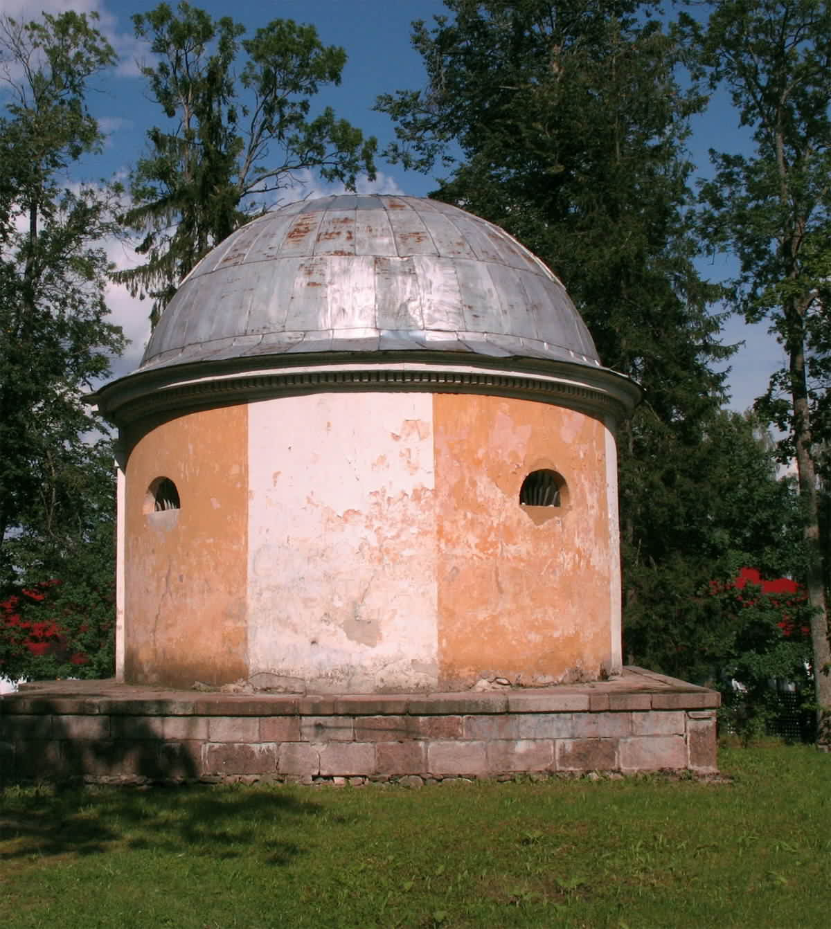 Mausoleum im Park von Aluksne